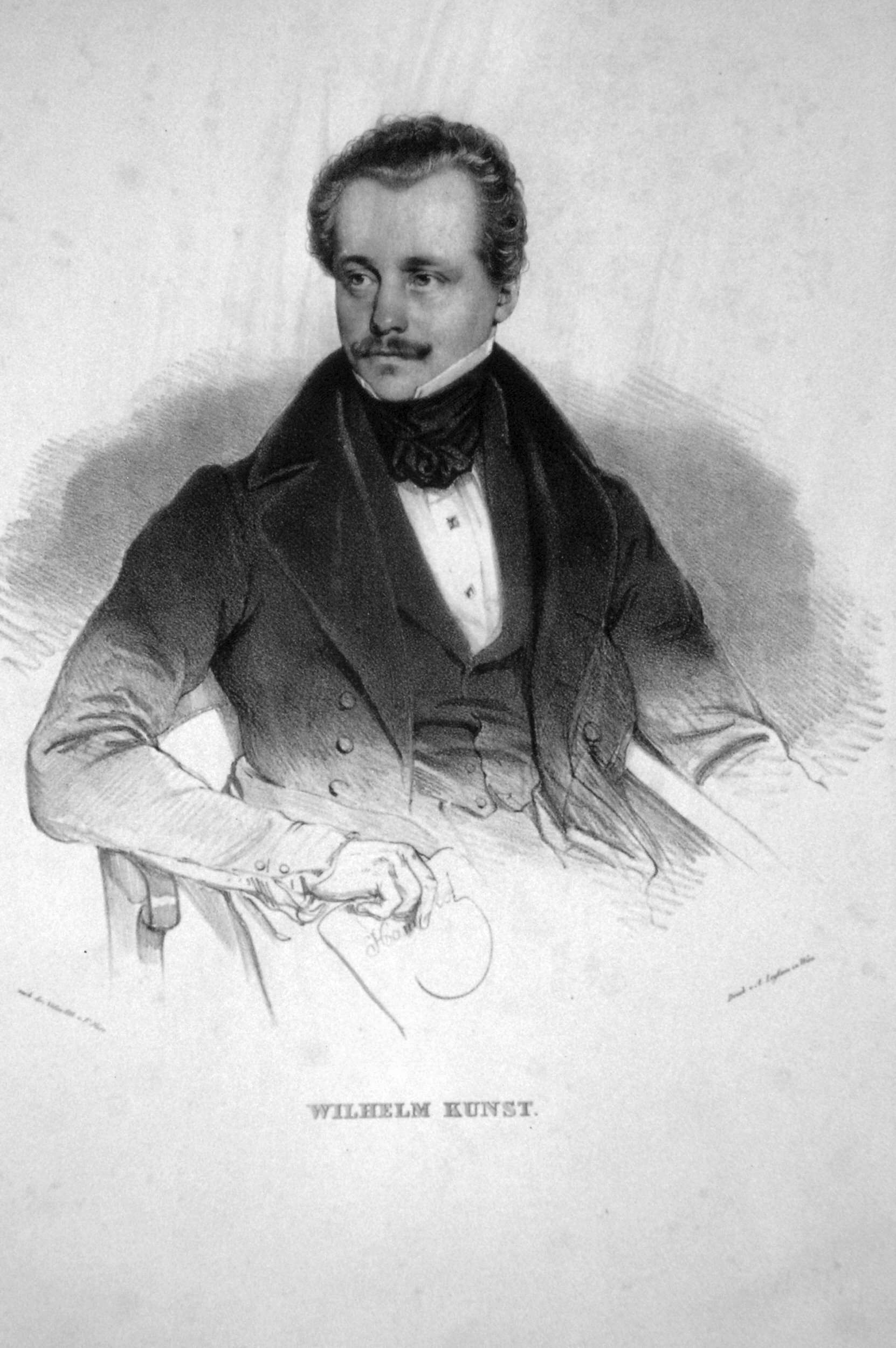 Wilhelm Kunst (1799-1859) Schauspieler Lithographie von Faustin Herr, ca. 1850